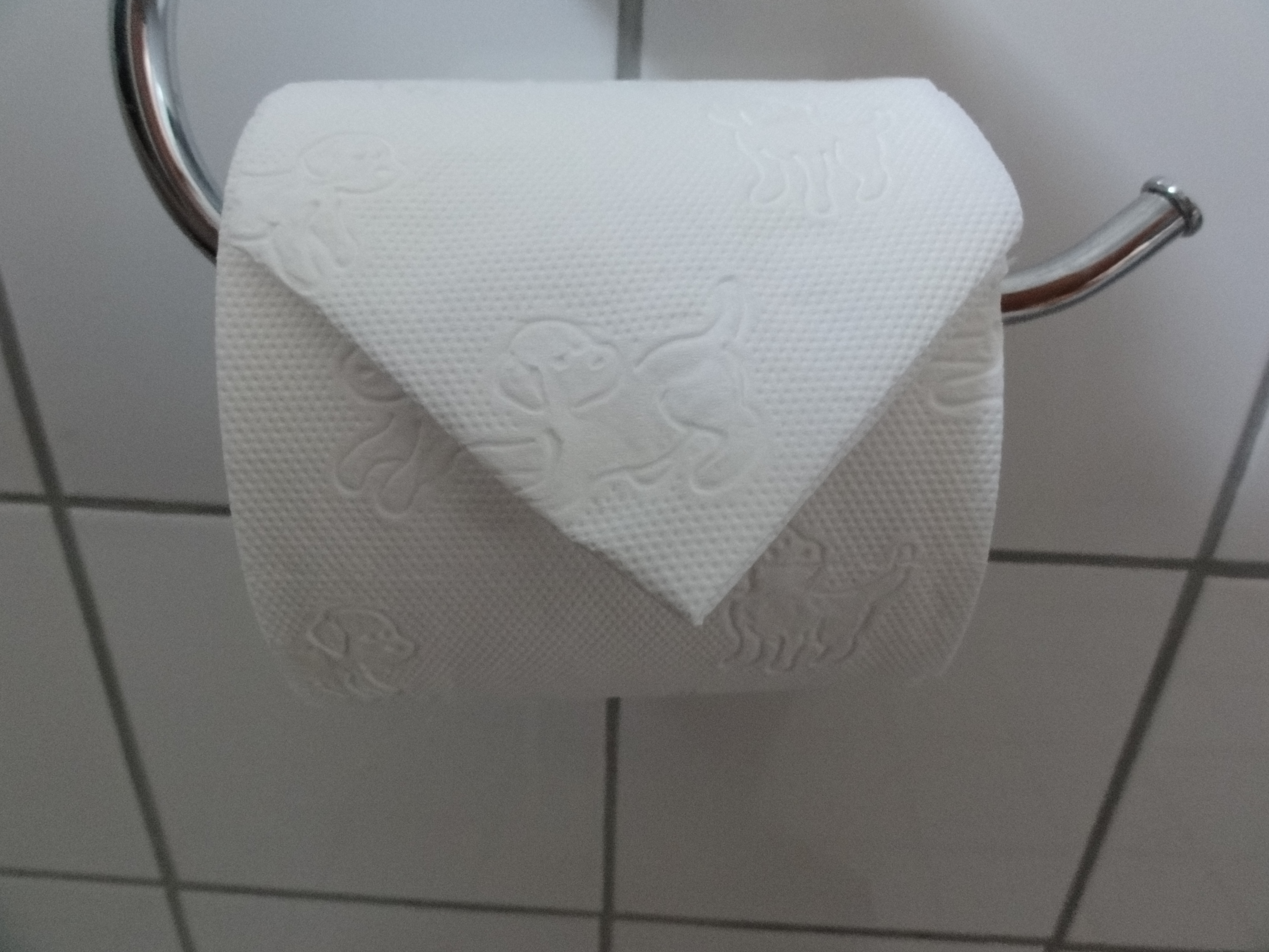 Kempten im Allgäu